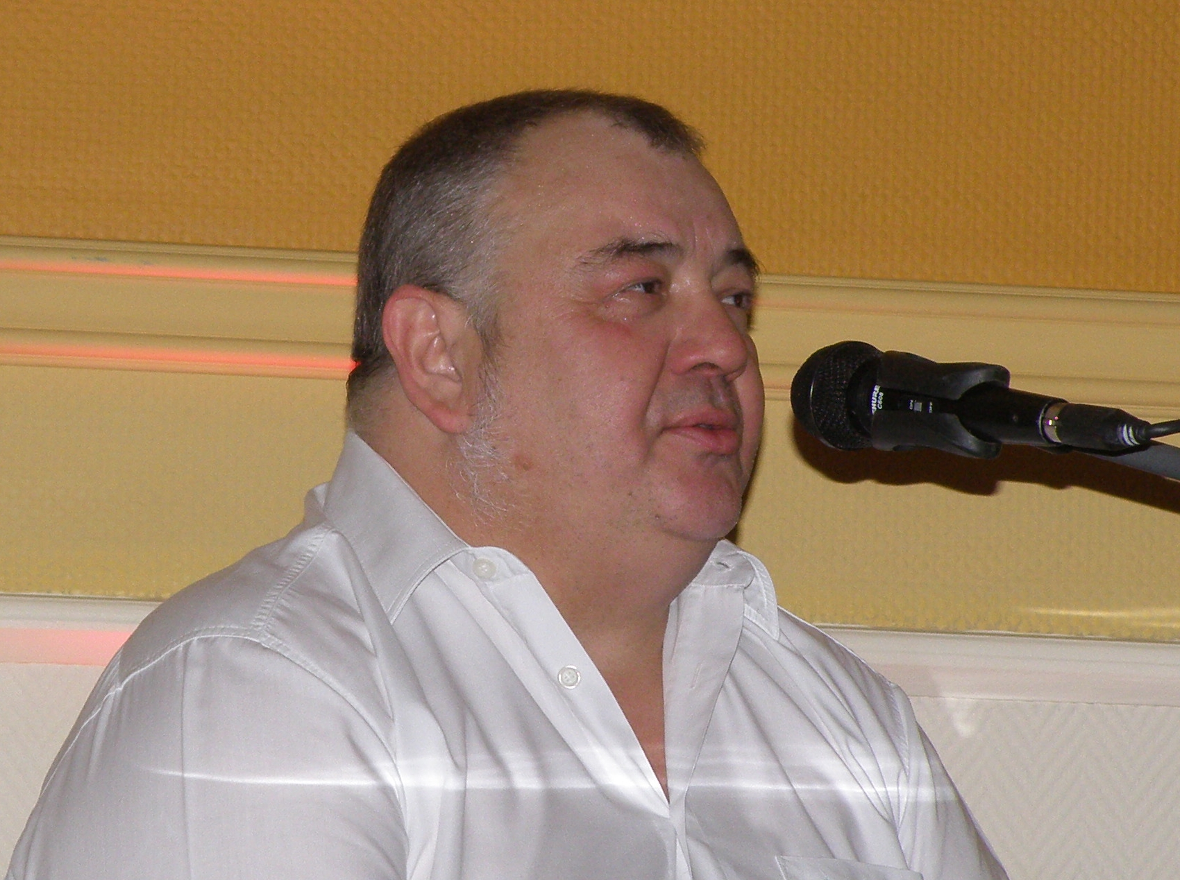 Stanisław Sojka